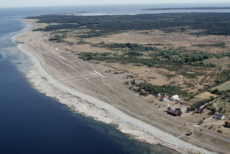 Motiv: Neptuni åkrar Nyckelord: Flygbilder, Naturreservat, Riksintressen Kategori: Kust- och skärgårdsmiljö, Gravfält Neptuni åkrar